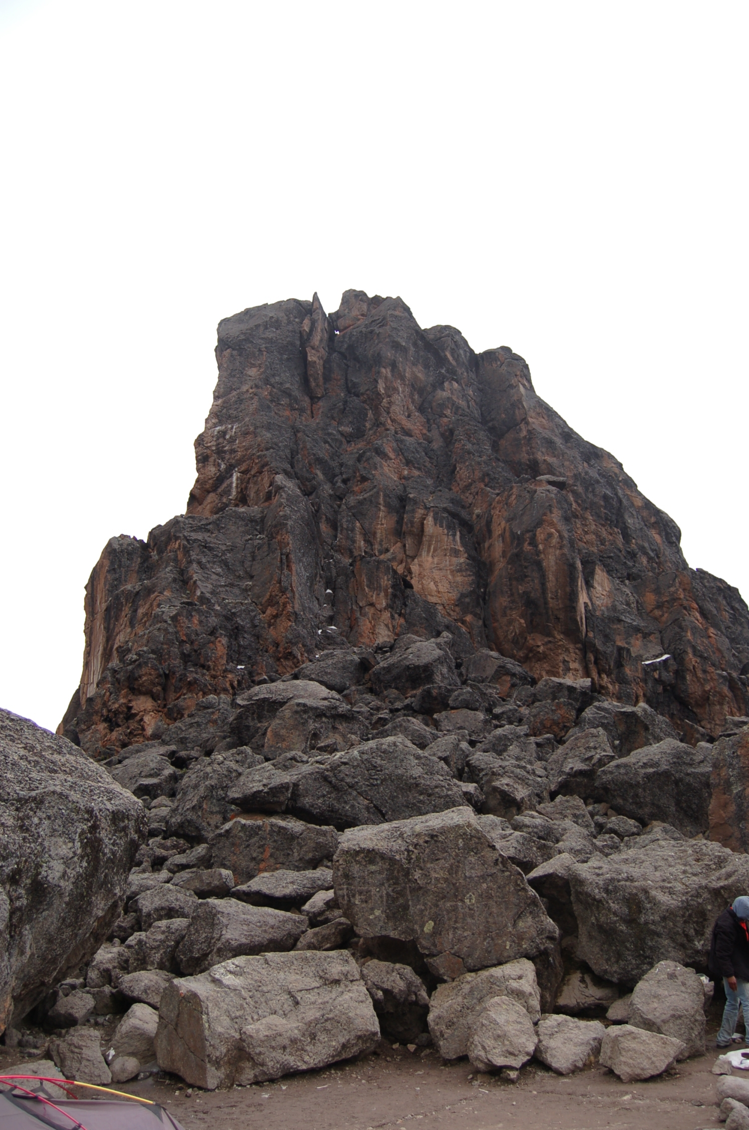 கற்குழம்புப் பாறை. கிளிமஞ்சாரோ மலை ஏறும் வழியில் முகாம் இடும் ஓரிடம். இதன் உயரம் 4642 மீ.